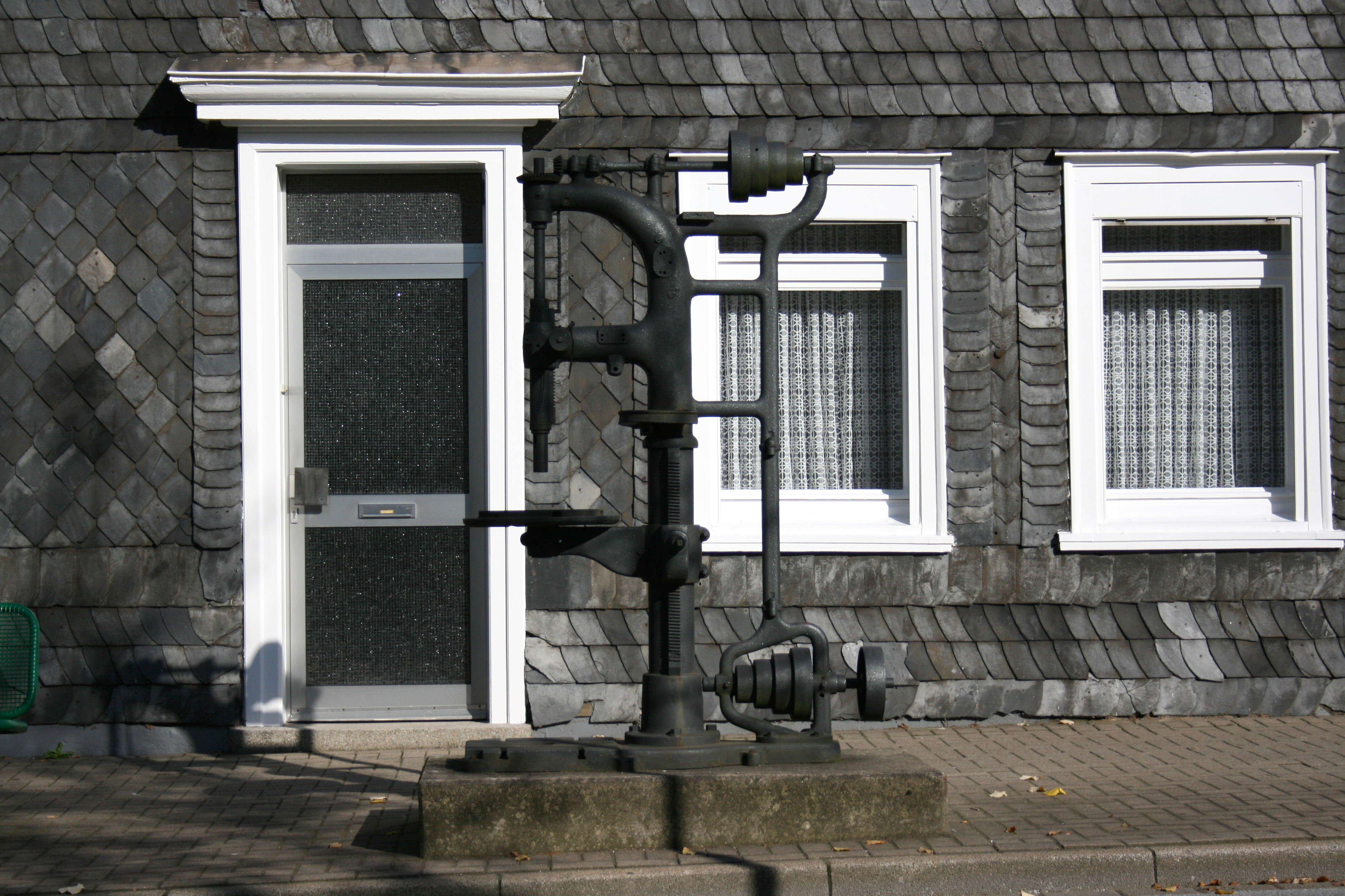 Lindenstraße in Ennepetal-Voerde; davor als Teil des Ennepetaler Straßenindustriemuseums eine Säulenbohrmaschine aus dem 19. Jahrhundert (Standort bis 1983: Modellabteilung der Voerder Fa. Saure)